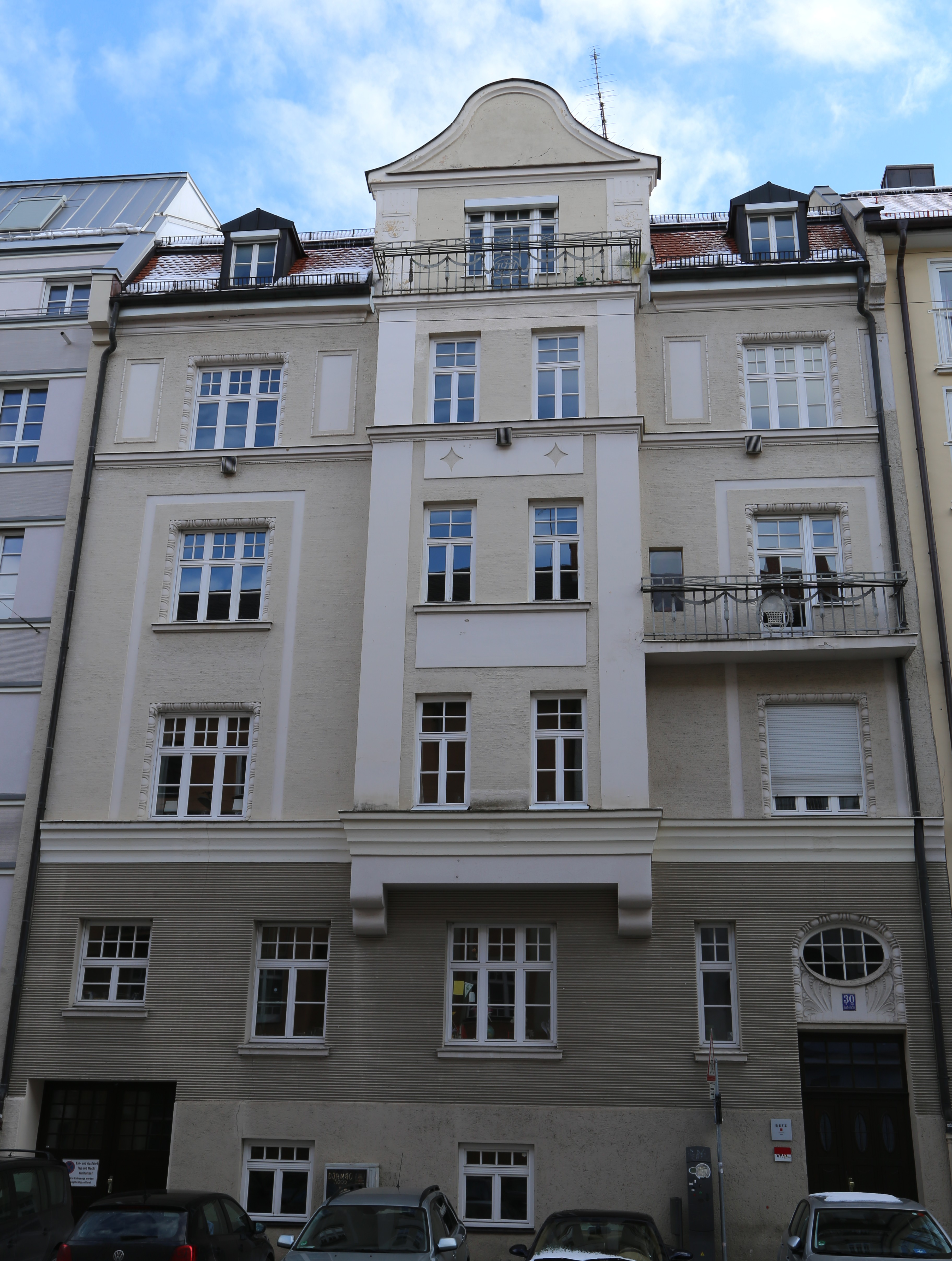 Isabellastraße 30; Mietshaus. Viergeschossiger Mansarddachbau mit Kastenerker, Zwerchhaus mit Schweifgiebel, Balkonen und reichem Putzdekor, in Formen des Jugendstils, um 1905.